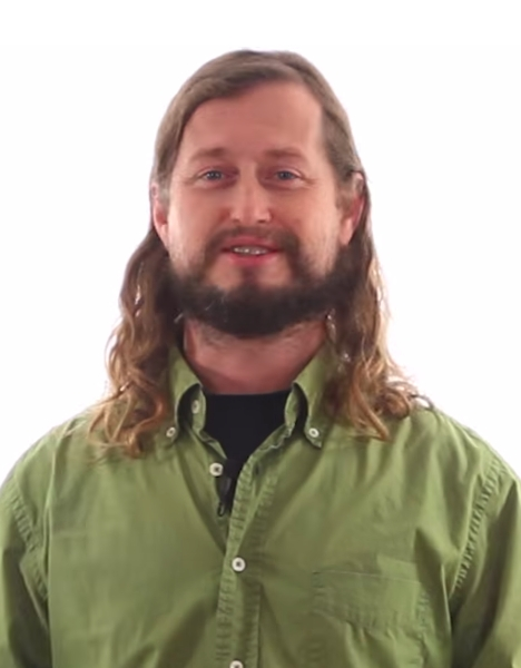 El robo de bebés y la compraventa es un crimen que se ha extendido hasta la primera década del 2000 en España. Pese a las miles de denuncias, la mayoría archivadas, ningún caso ha sido resuelto por los tribunales. Por eso, hemos presentado y aprobado esta propuesta para que el Gobierno destine recursos para realizar una investigación profunda y eficaz